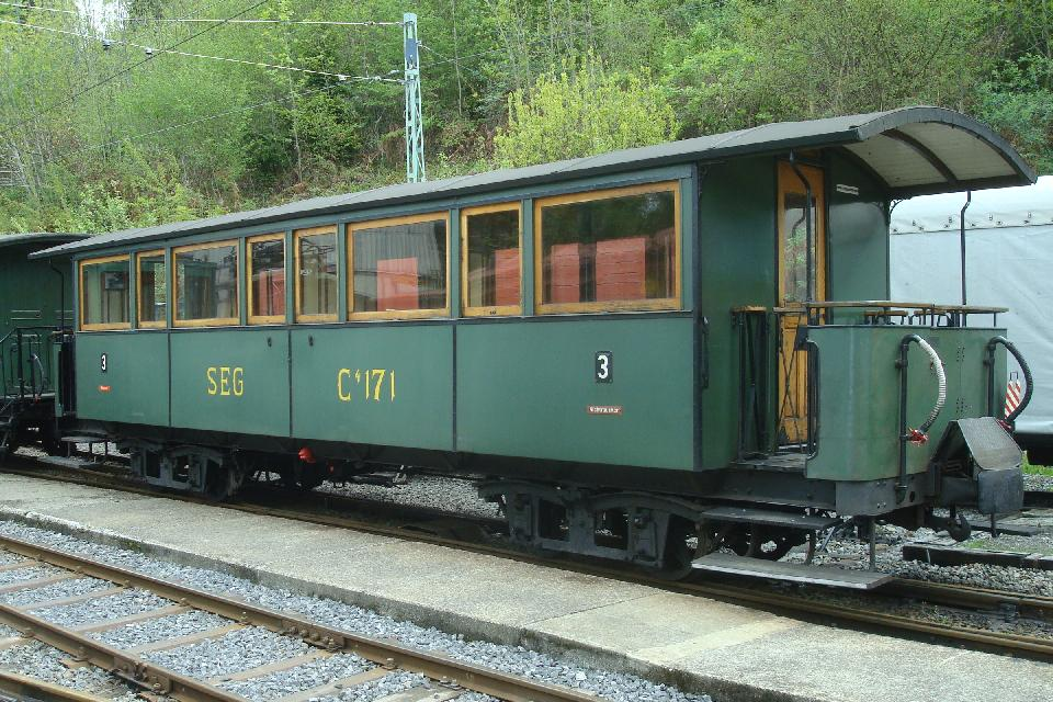 Historischer Personenwagen C4 171 mit Holzkohlenheitzung der Süddeutsche Eisenbahn-Gesellschaft (SEG) bei der Museumsbahn Blonay–Chamby in Chamby-Musée (Chaulin) im Sommer 2010.